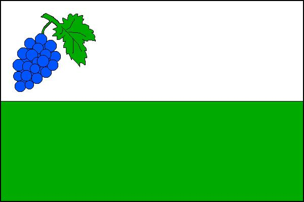 Vlajka obce Viničné Šumice